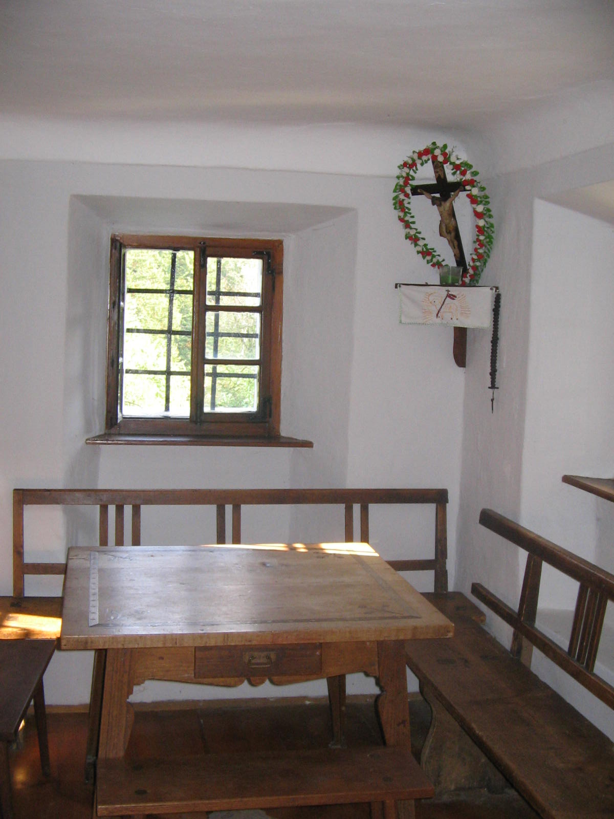 Geburtshaus von Anton Aškerc, slowenische Dichter Quelle: eigene Aufnahme 16. Oct. 2005 Fotograf: Janez Novak, Ljubljana, Slovenija